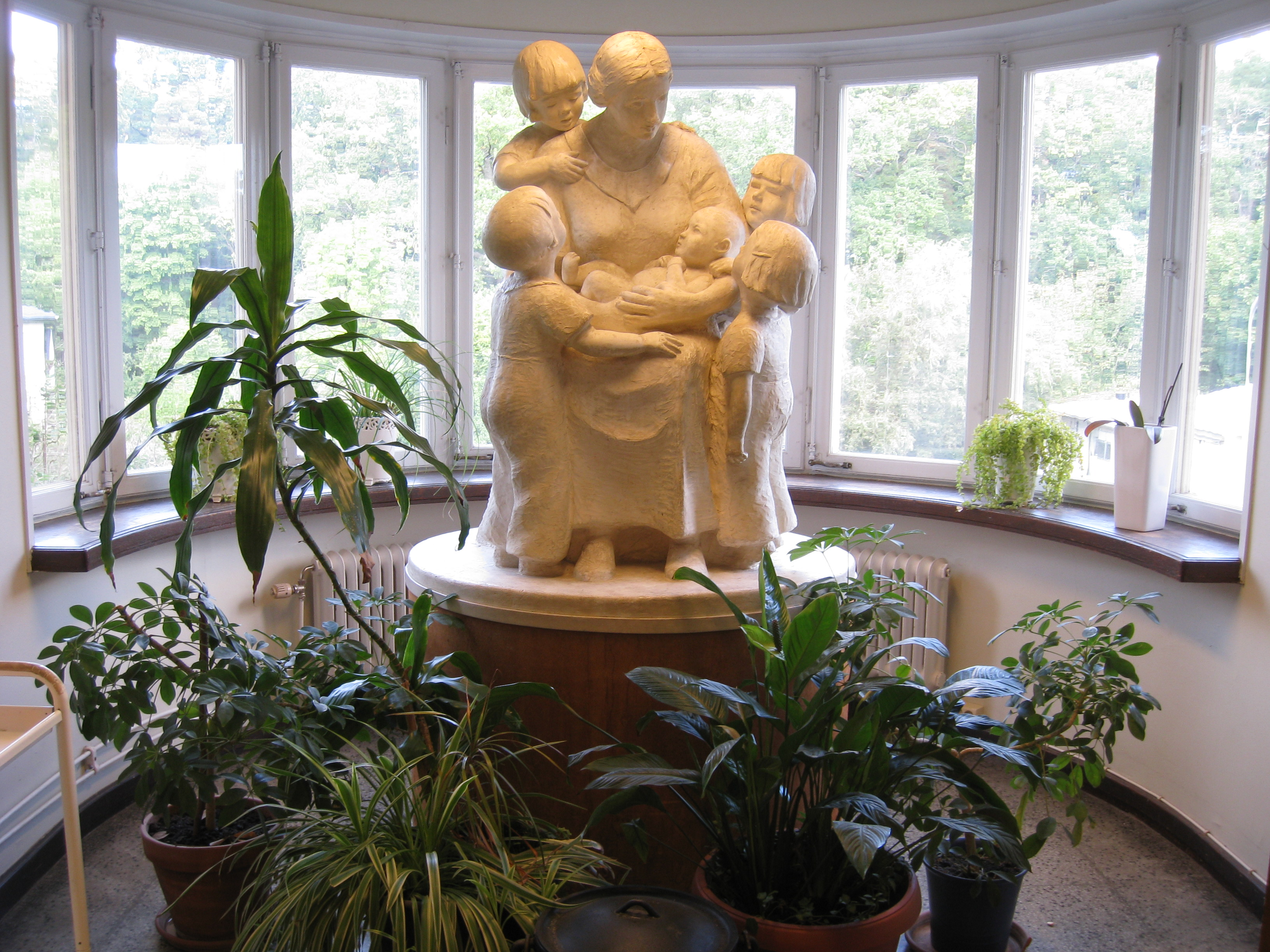 Olovslundsskolan i Olovslund, Bromma. Interiör från rundeln mot Gustav III:s väg. Skulptur i gips, som står i entrén till expeditionen till Olovslundsskolan, utförd av skulptören Signe Ehrenborg-Lorichs (1889-1979) och skänkt till skolan 1945.